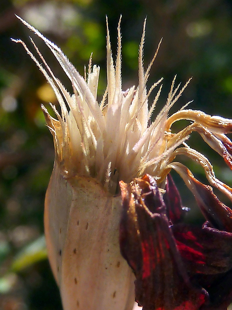 Tagetes erecta (Clavelón de la India, cempasúchil, ...): Capítulo post-antesis con las escamas subuladas y escábridas en su parte superior del tipo más largo del vilano de las cipselas, sobresaliendo del involucro pentagonal constituido por una serie única de brácteas parcialmente conadas - Ornamental, Calle Goya, Madrid (España).